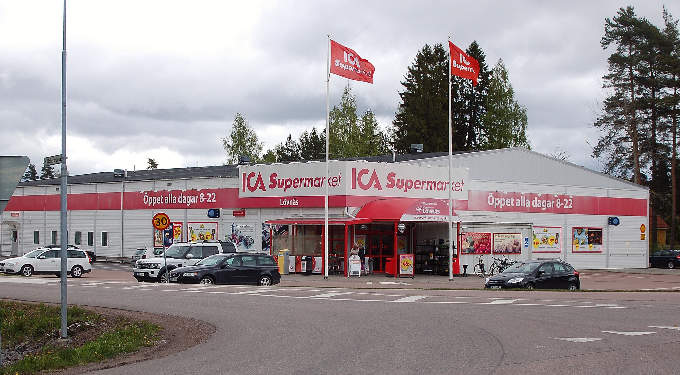 Ica daglivarubutik i Lövnäs, Hammarö.